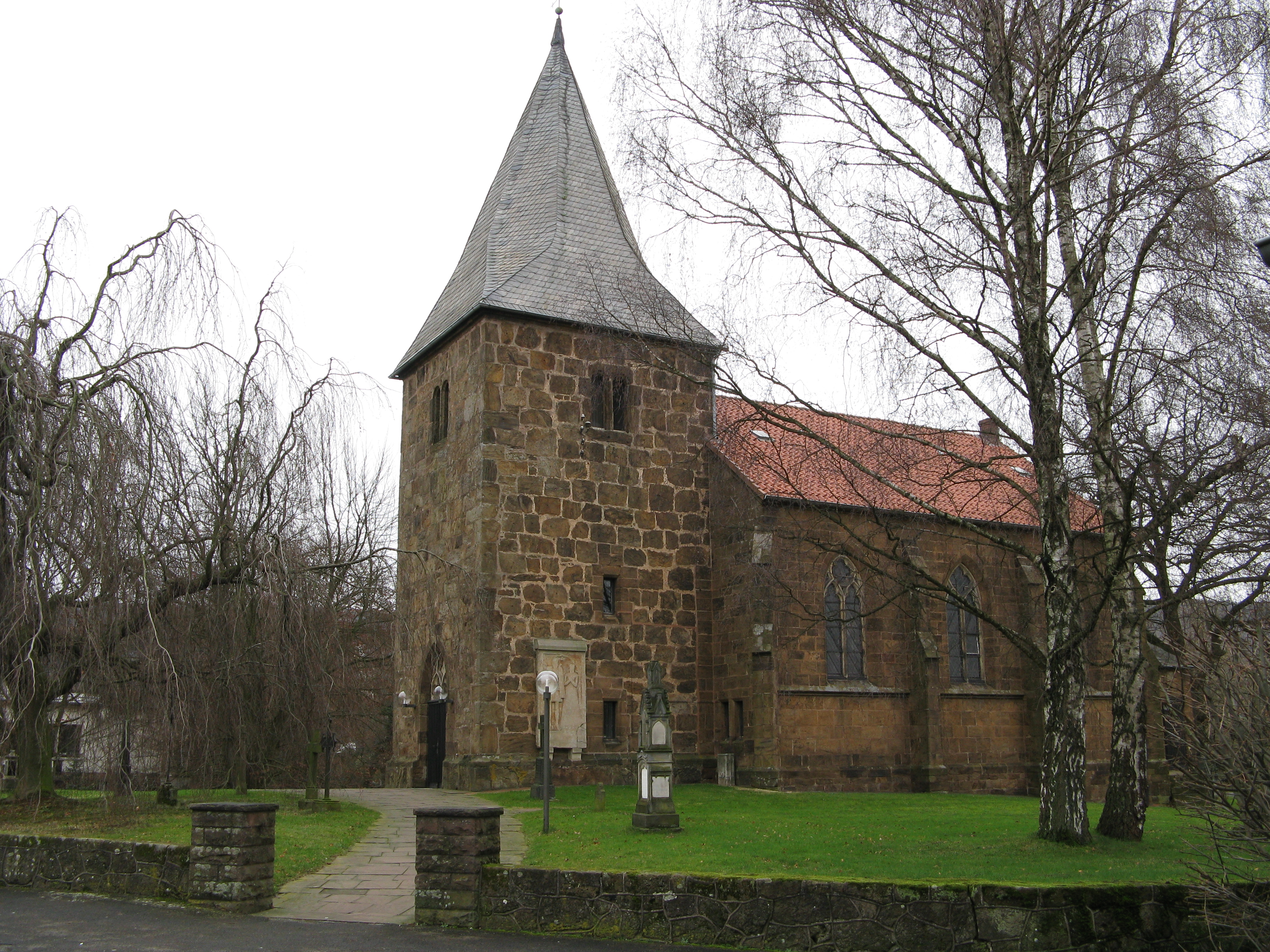 Volmerdingser Kirche